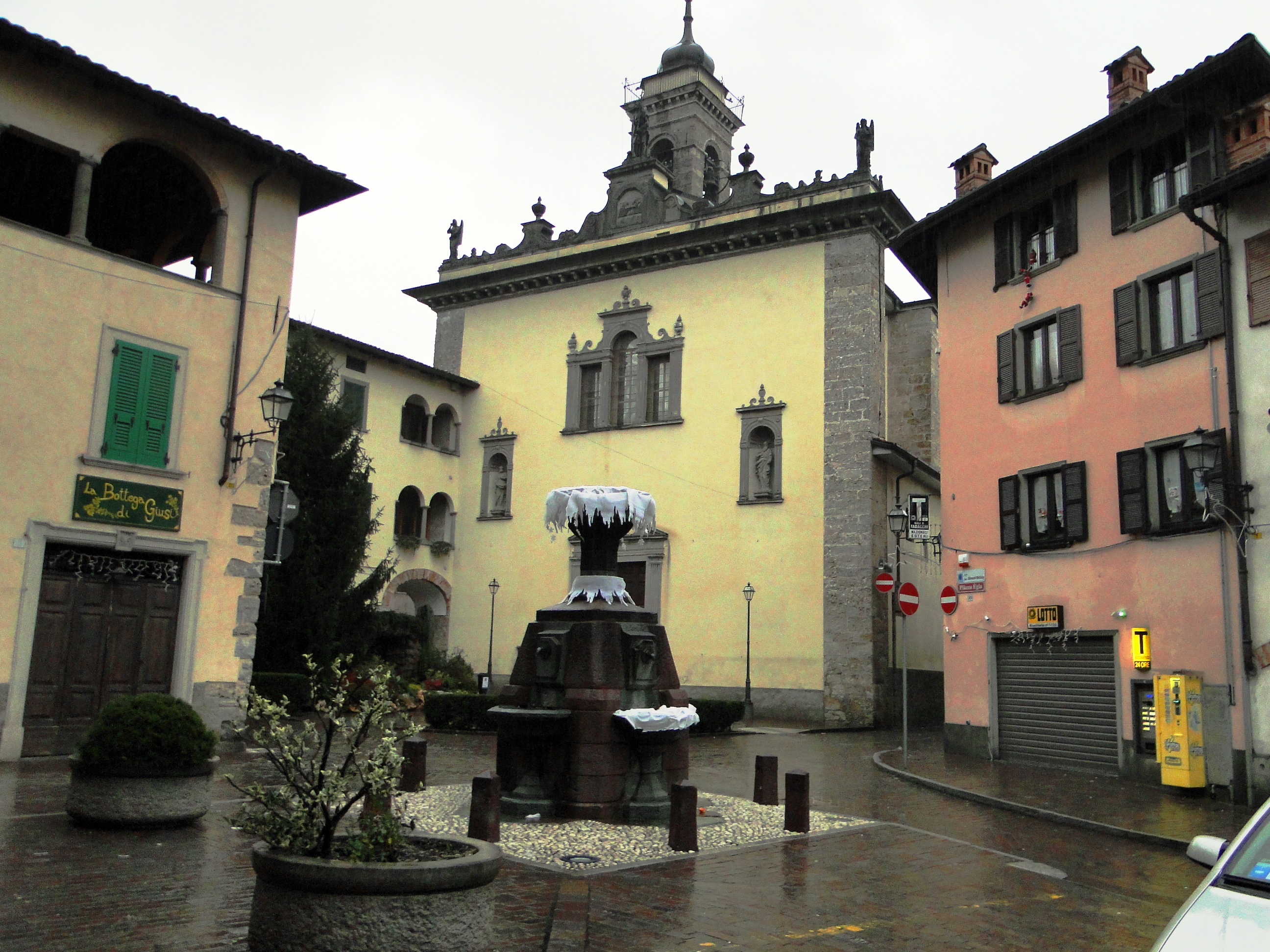 Il Fontanone e la chiesa parrocchiale. Piazza Vecchia di Casnigo (BG)